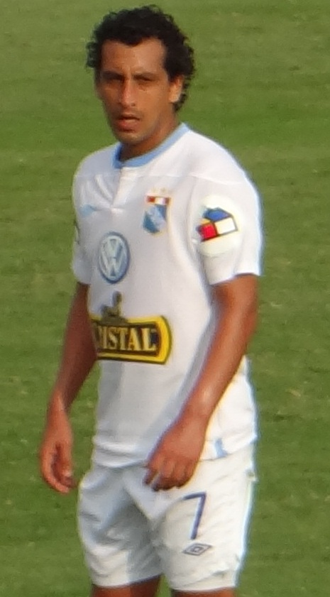 Futbolista peruano Renzo Sheput en 2012